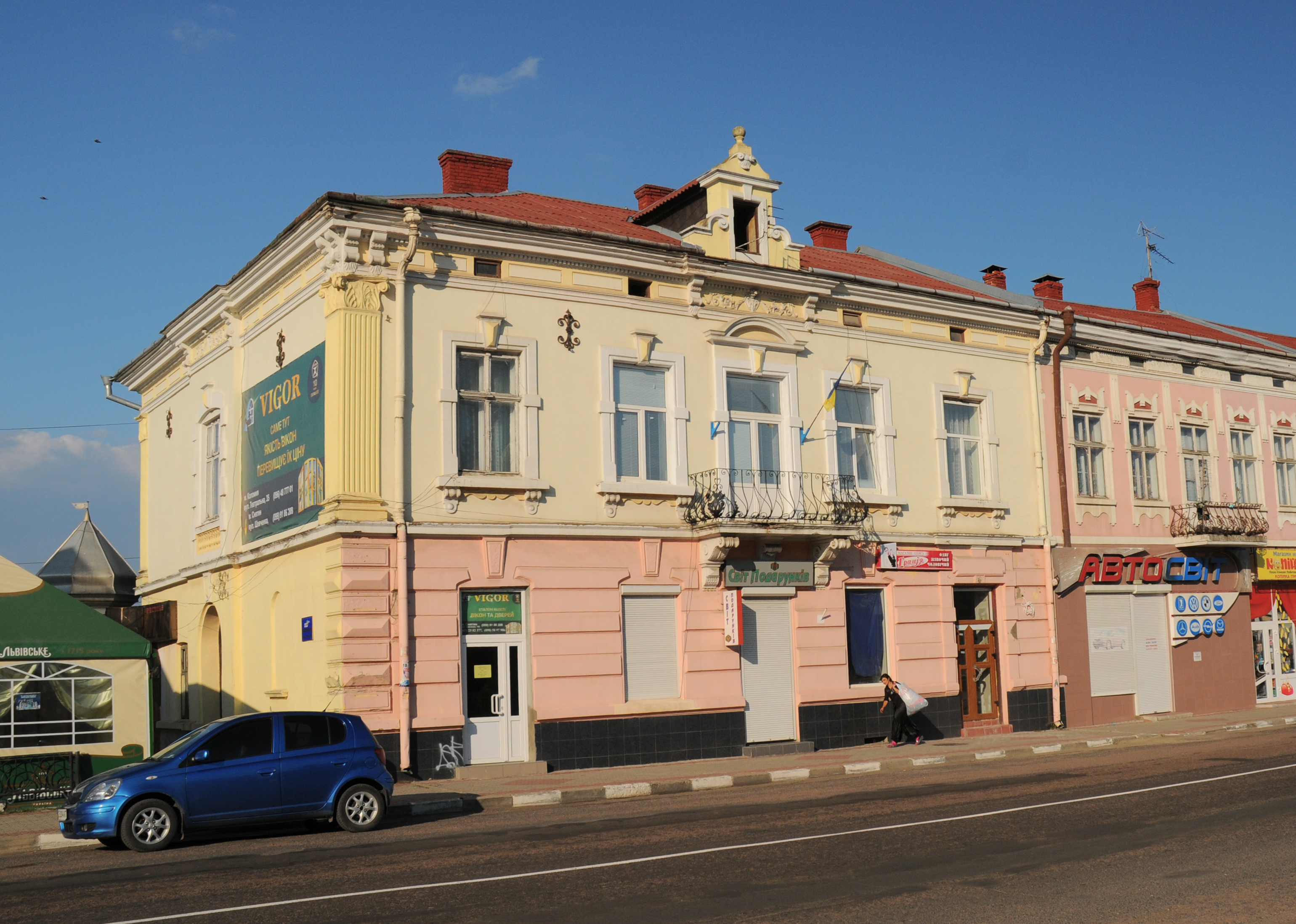 Снятин вул. Шевченка, 143